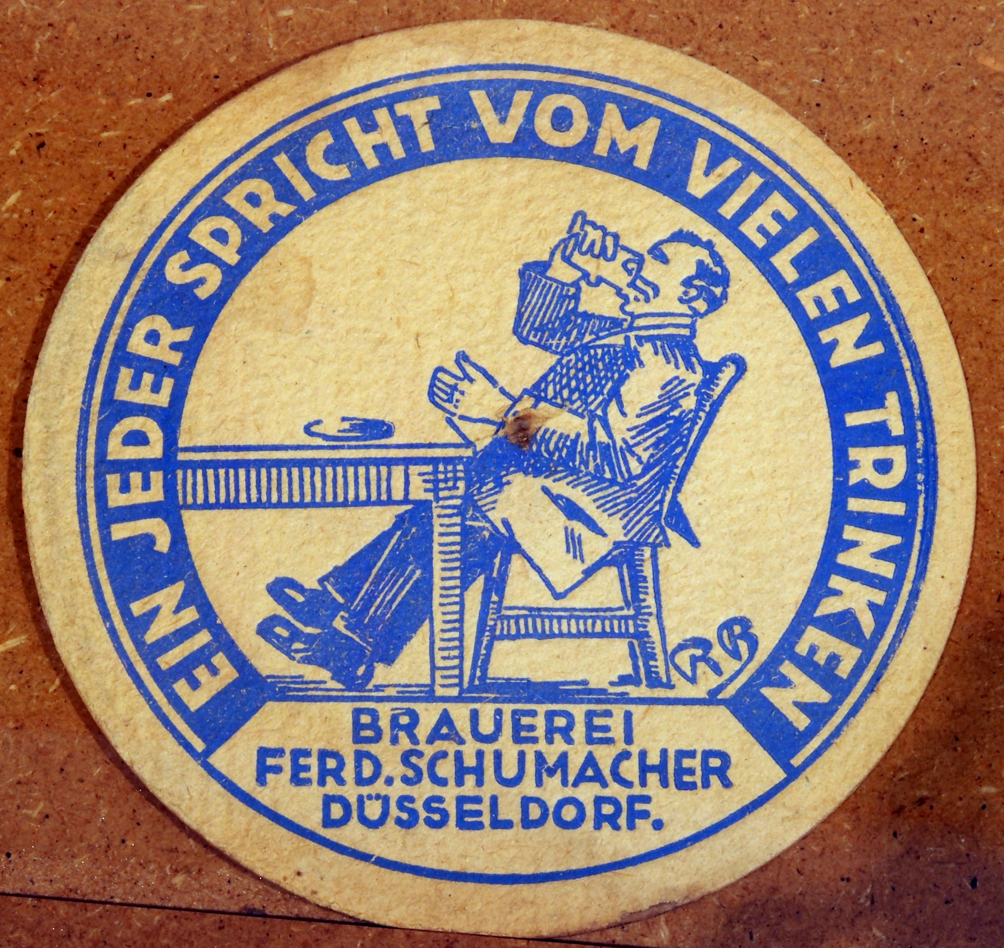 Brauerei Ferd.Schumacher Dusseldorf. (Photographed through glass.)